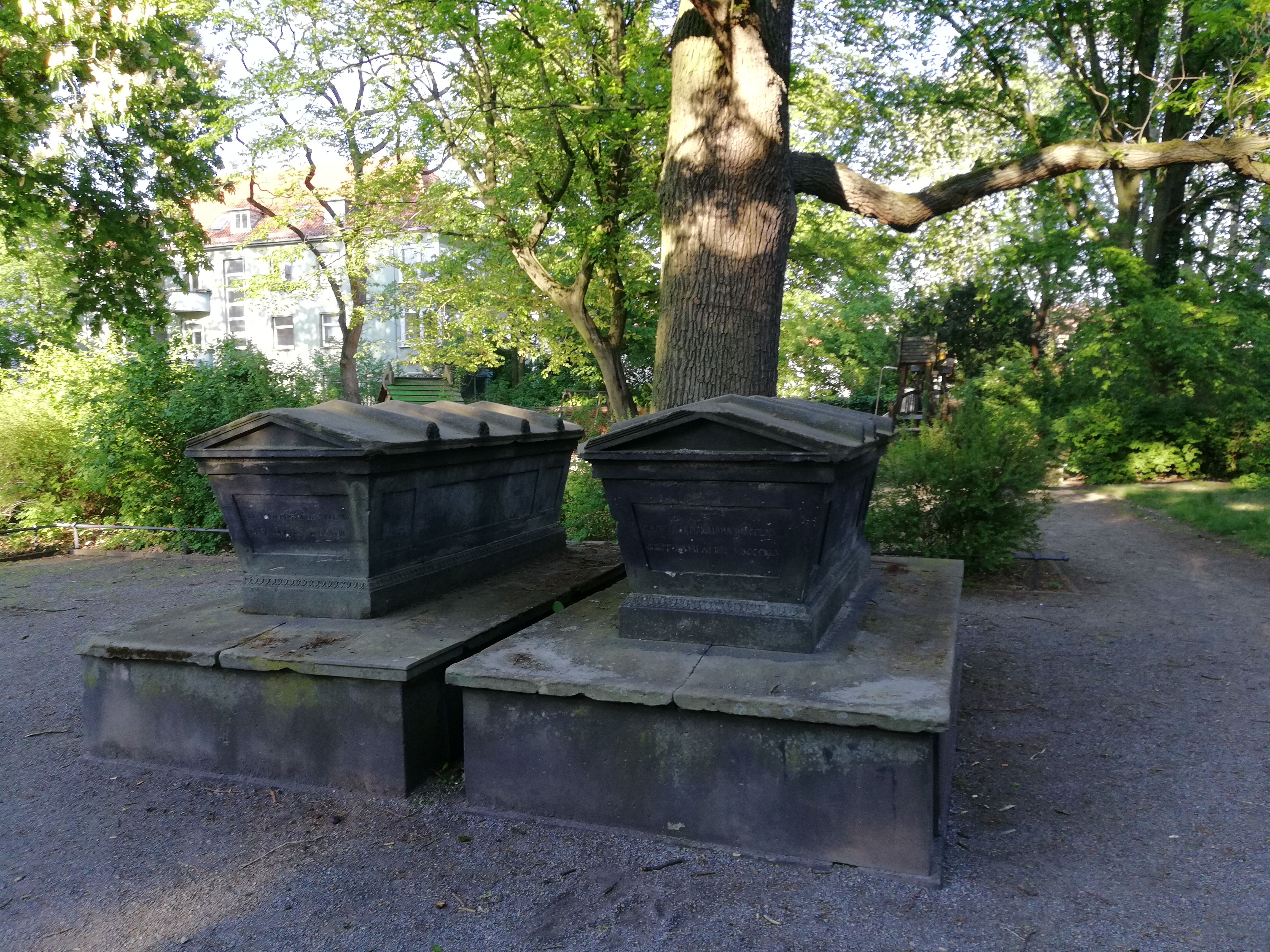 Test